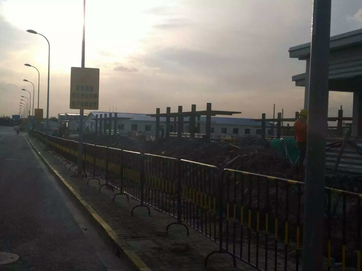 中文（中国大陆）: 在建的申昆路枢纽站